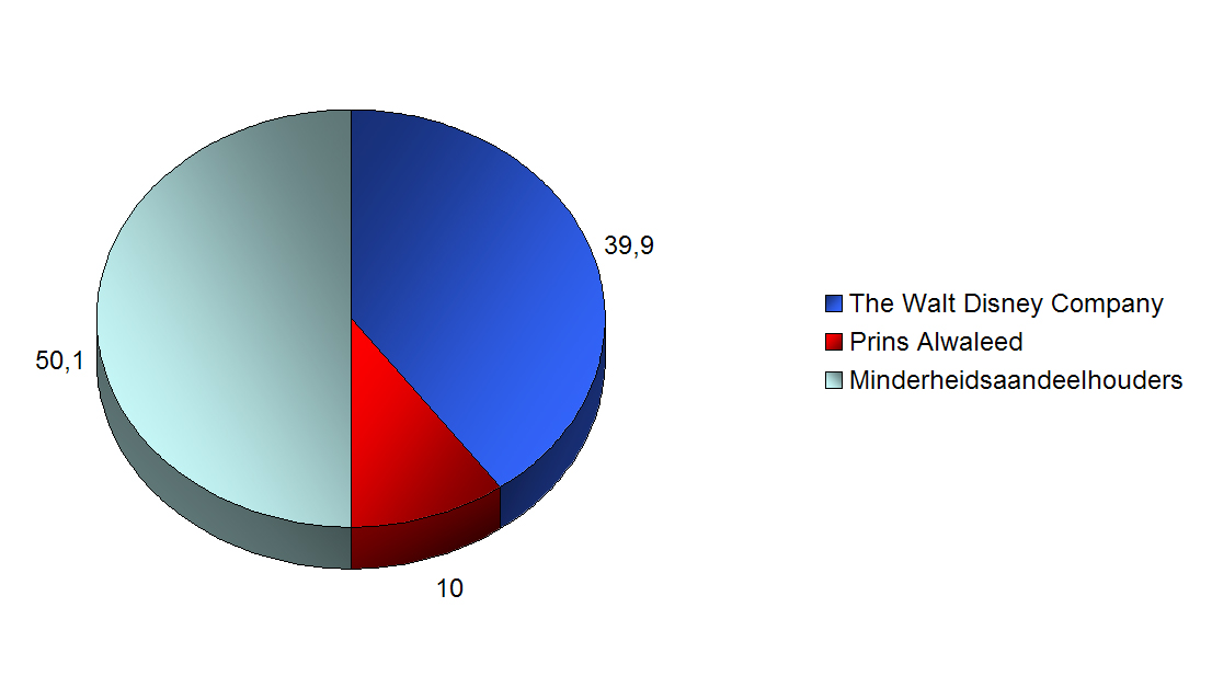 zelf gemaakt